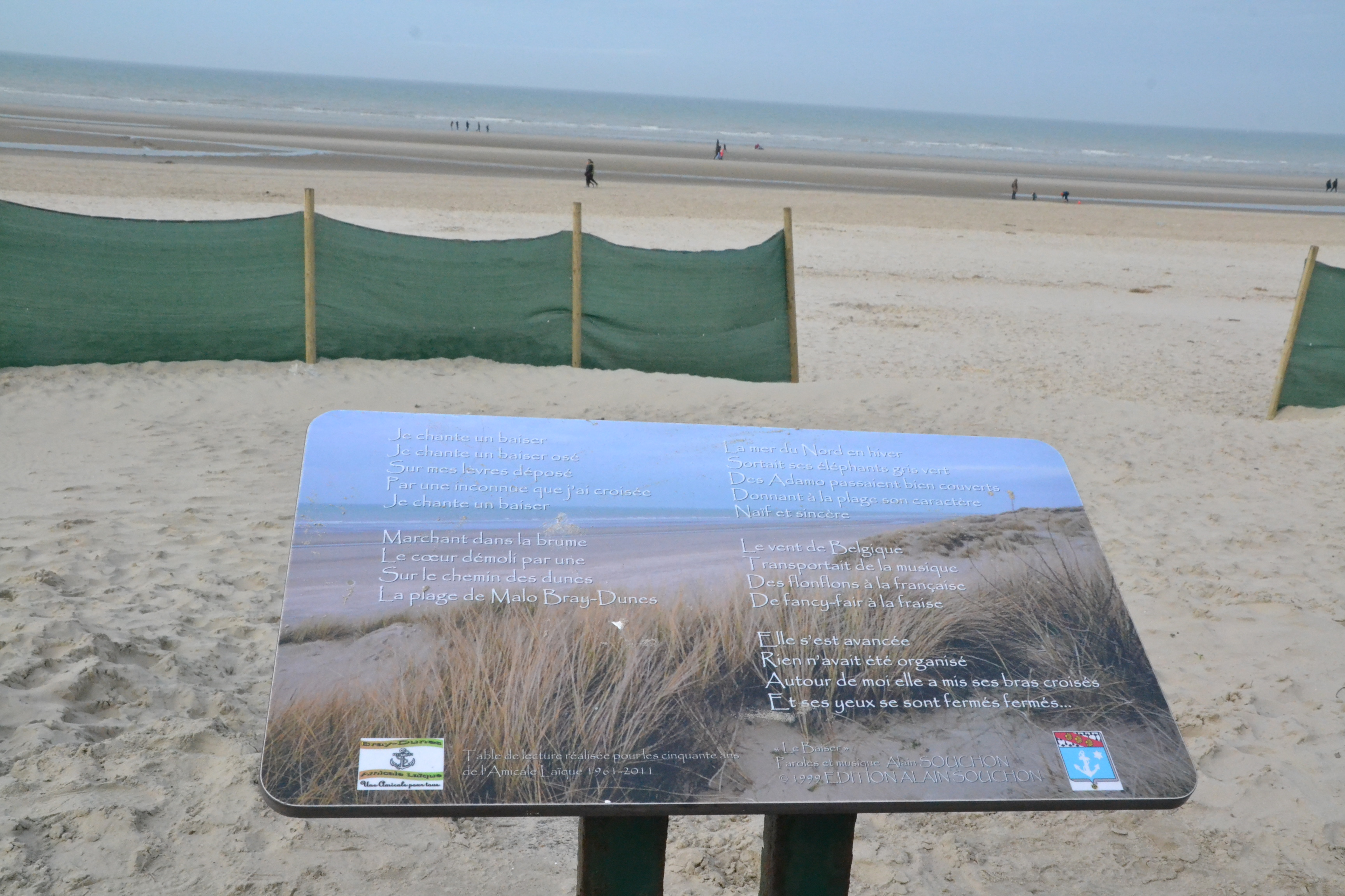 Panneau présentant les paroles de la chanson Un baiser (Alain Souchon), se déroulant à Bray-Dunes (Nord, France).